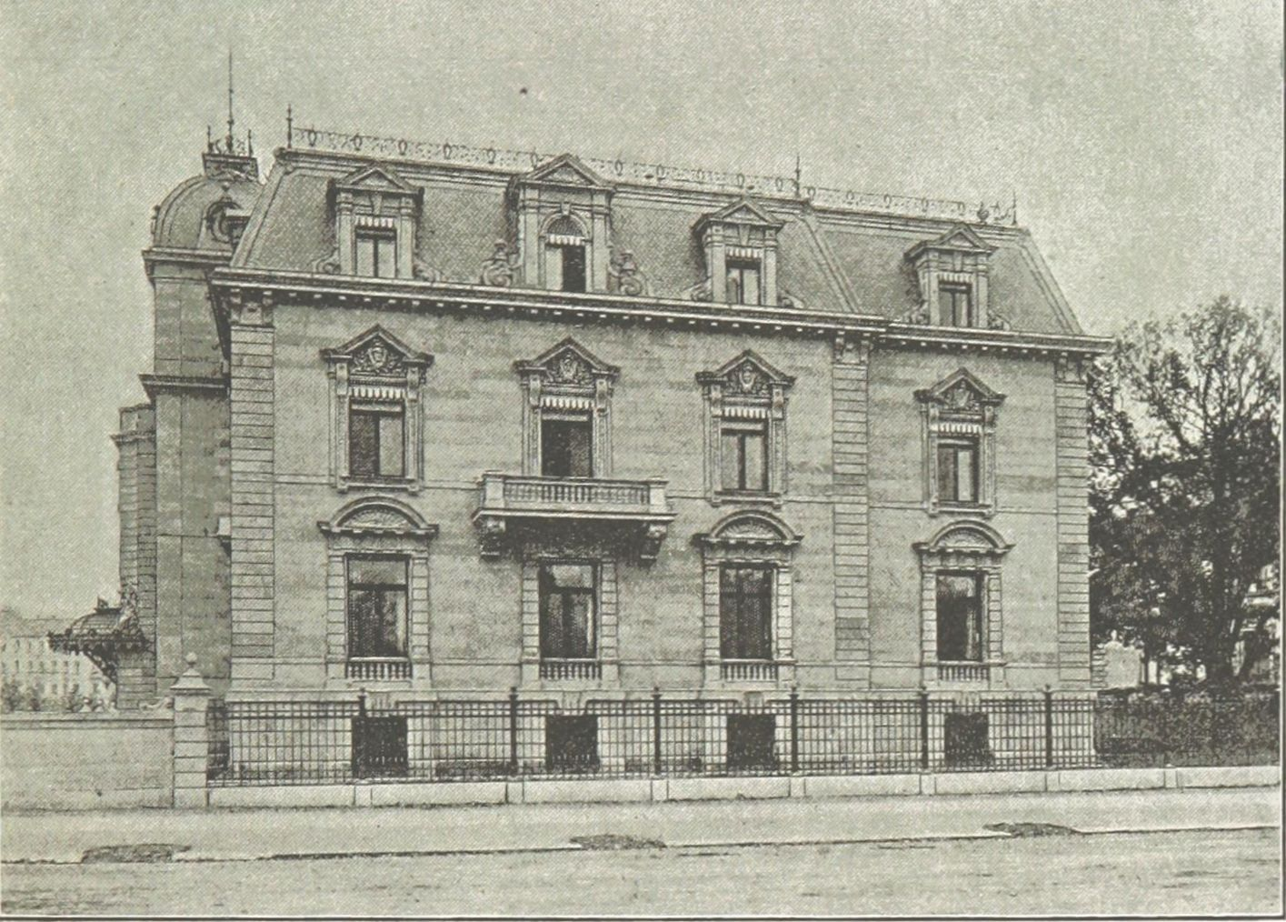 Villa Beckmann in der Karl-Tauchnitz-Straße in Leipzig, an der Einmündung der Ferdinand-Rhode-Straße. Offensichtlich Karl-Tauchnitz-Straße 10, also Standort der modernistischen Dependance der Galerie für zeitgenössische Kunst. - Ansicht von der Karl-Tauchnitz-Straße aus.